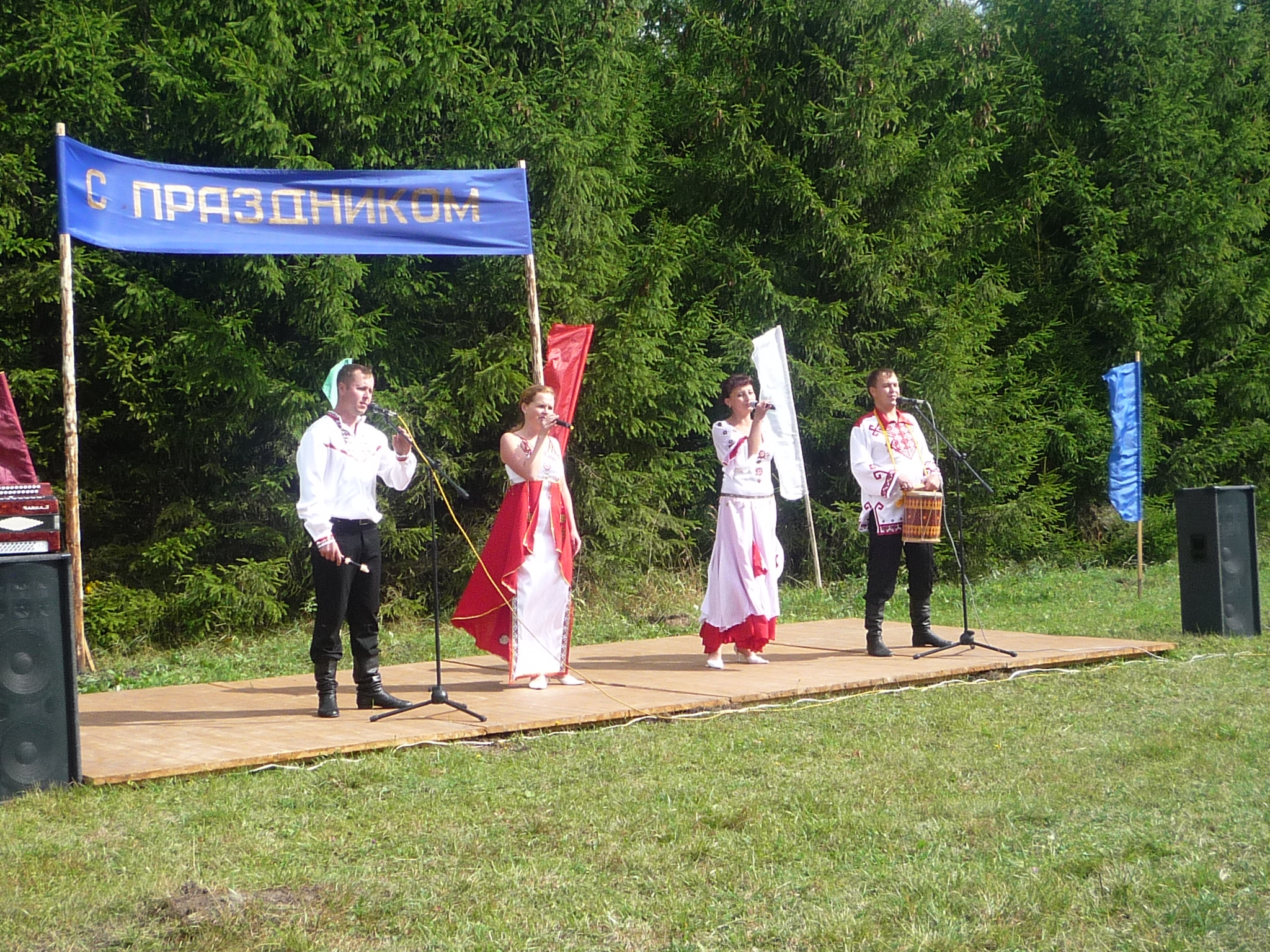 Ансамбль Савал в Алшихово